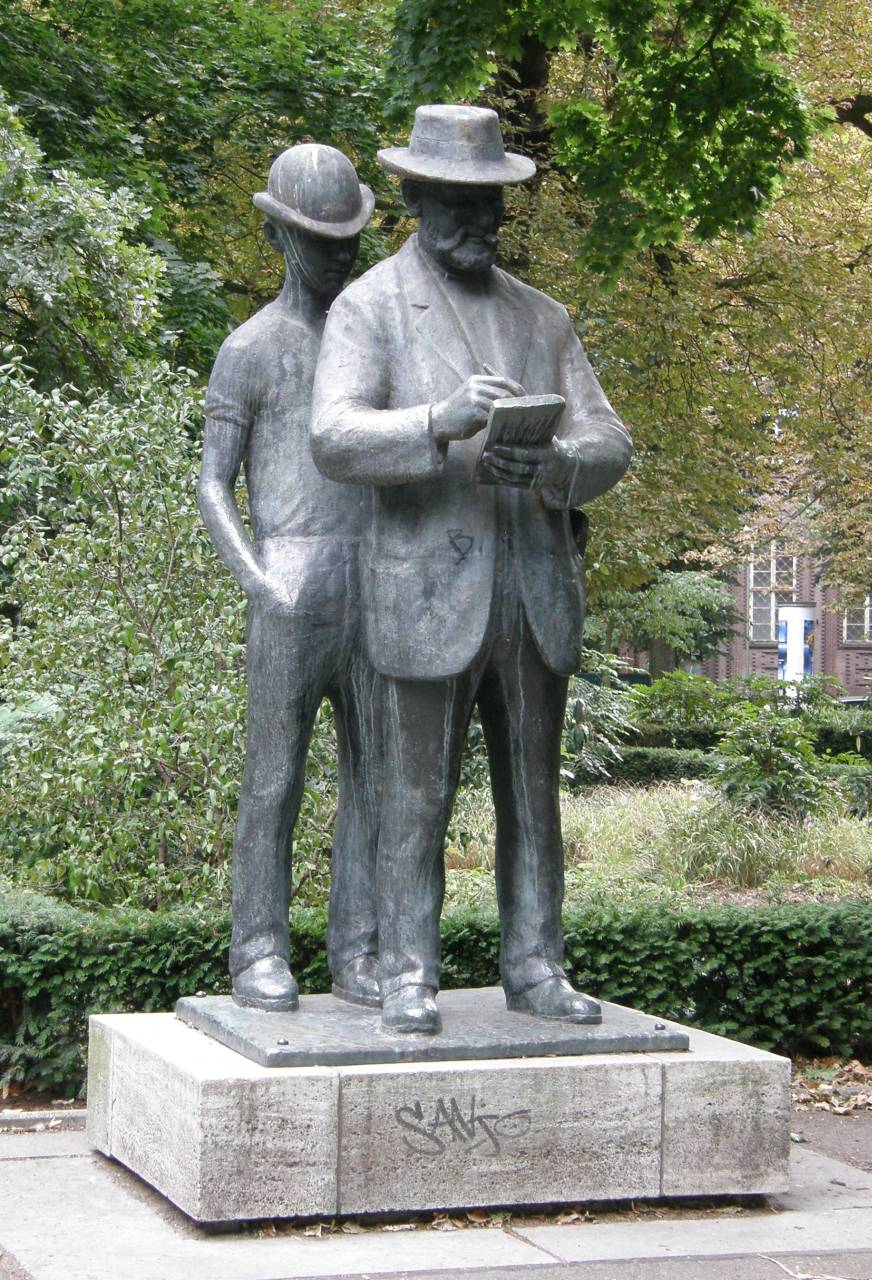 Heinrich Drake: Signatur im Heinrich-Zille-Denkmal. 1965, Bronze. Köllnischer Park, Wallstraße 51, Berlin-Mitte.